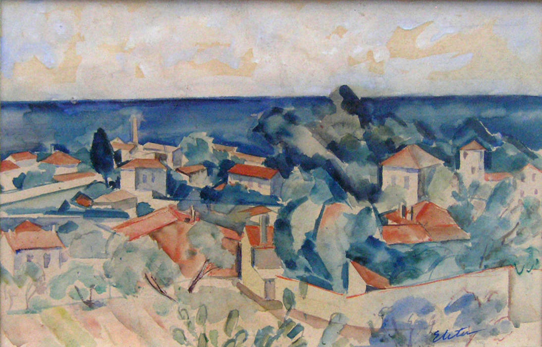 Obraz "Elster Saint Tropez"